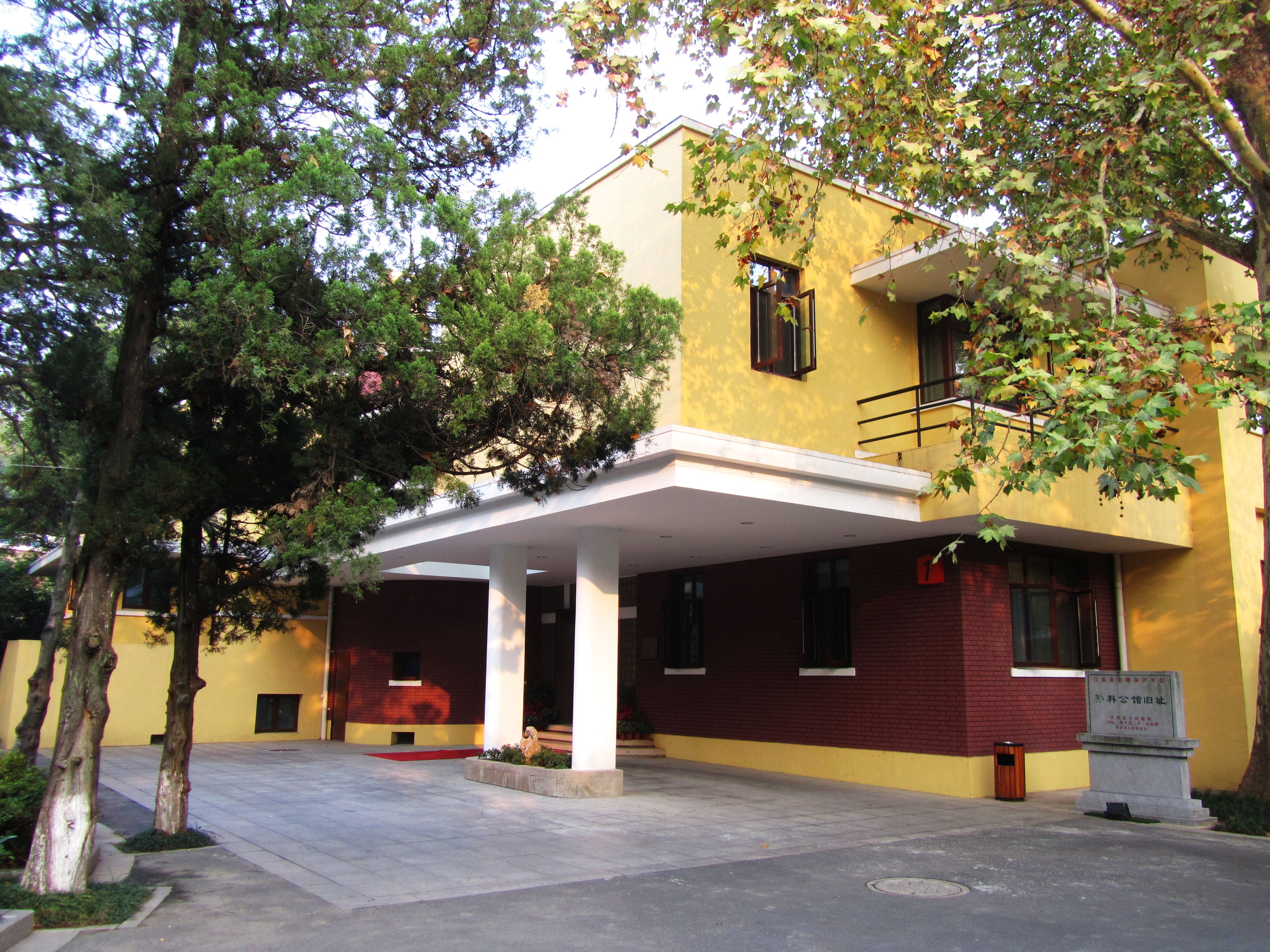 位于紫金山东苑宾馆内的孙科公馆旧址。